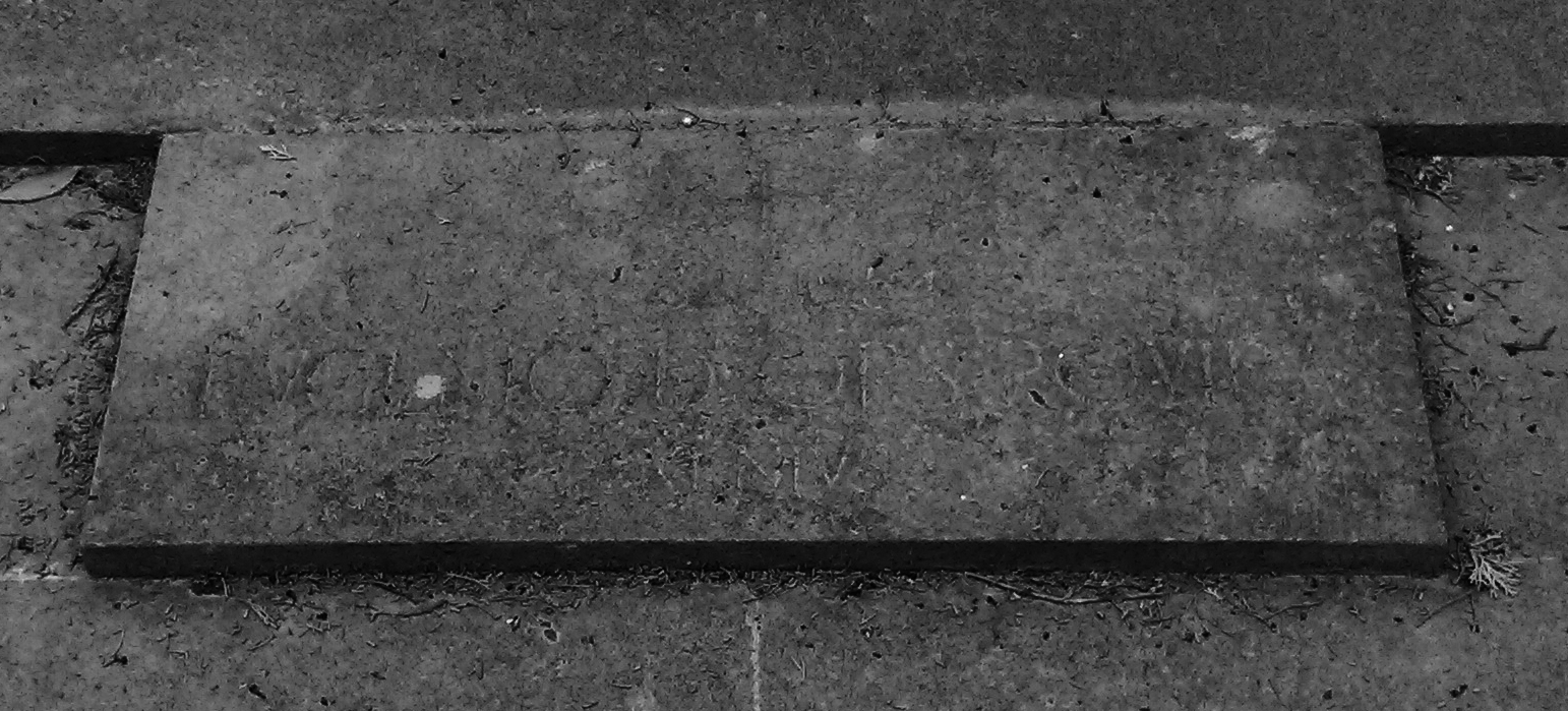 Es casi ilegible, pero es el nombre Eugenio D'Ors en su tumba